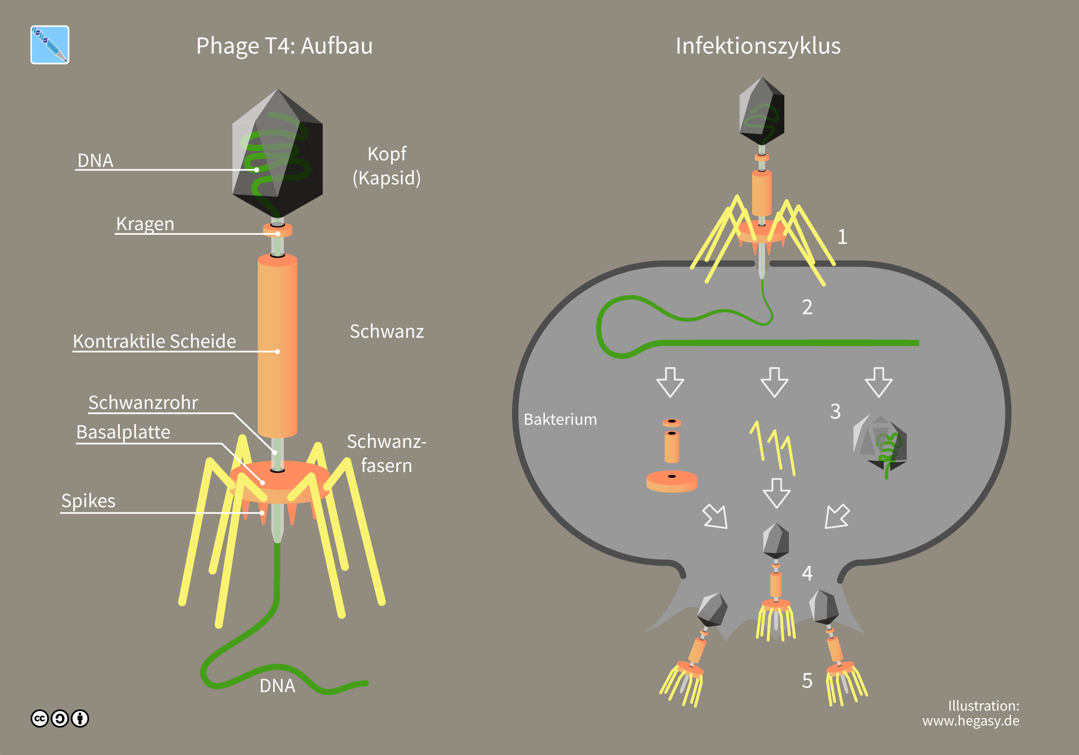 Aufbau und Infektionszyklus von Phage T4. 1: Bindung an Bakterium, 2. Injektion der Phagen-DNA, 3. Synthese von Phagen-Komponenten, 4. Zusammenbau neuer Phagen, 5. Platzen des Bakteriums, Freisetzung infektiöser Phagen.